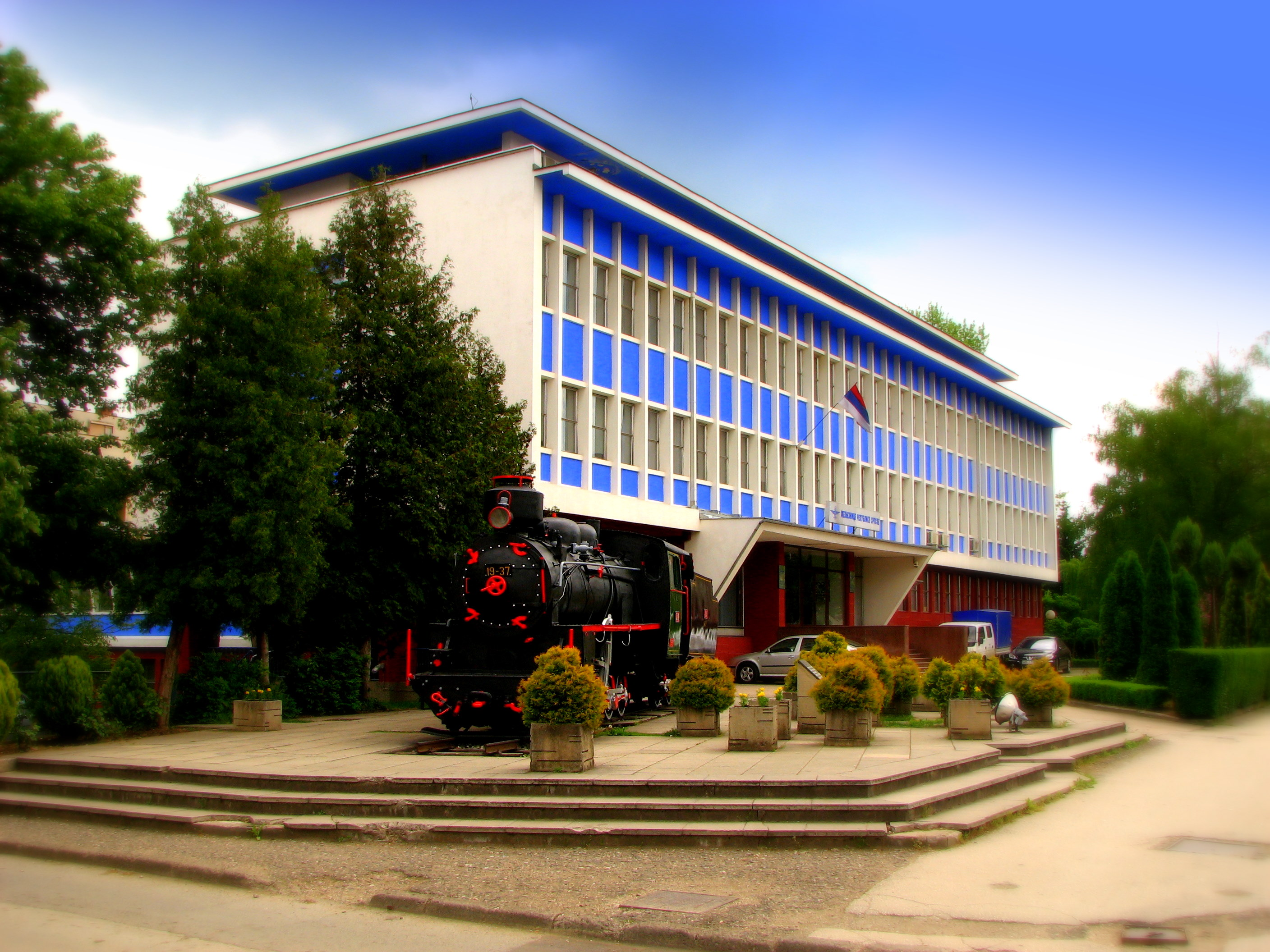 Зграда Жељезница Републике Српске Аутор: Бранко Д. Тодоровић